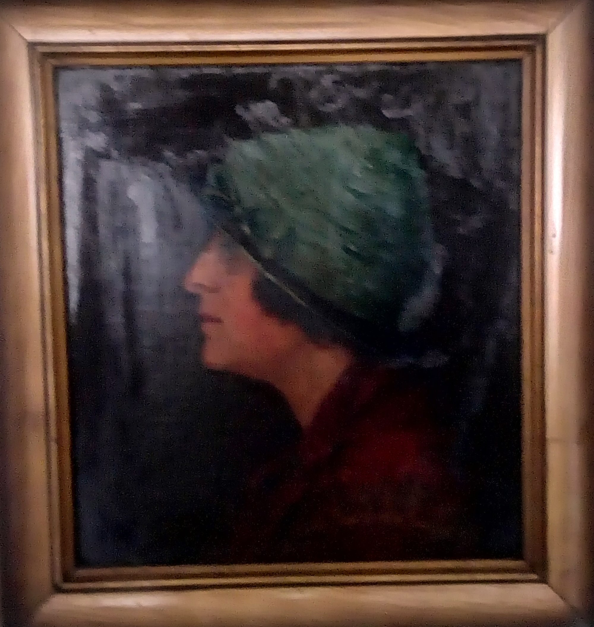 Dáma v klobouka